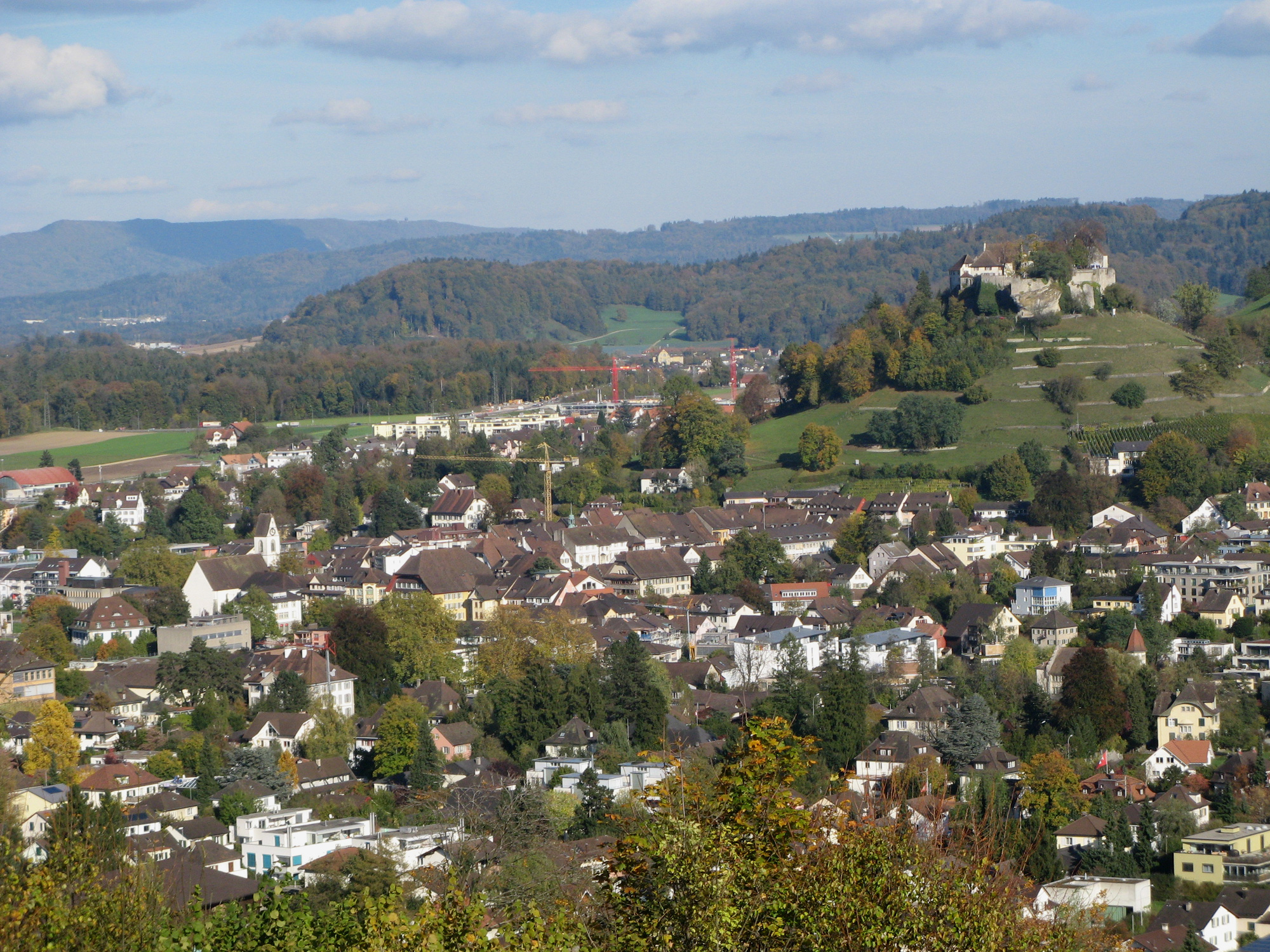 Ansicht von Lenzburg, auf dem Staufberg aufgenommen